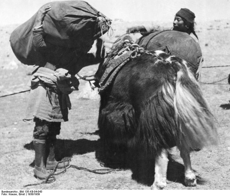 Tibetexpedition, Beladen von Jaks Gayokang-Gayamtsona [Gyamtsona]-See, Beladen der Karawane [Jak, Yak]